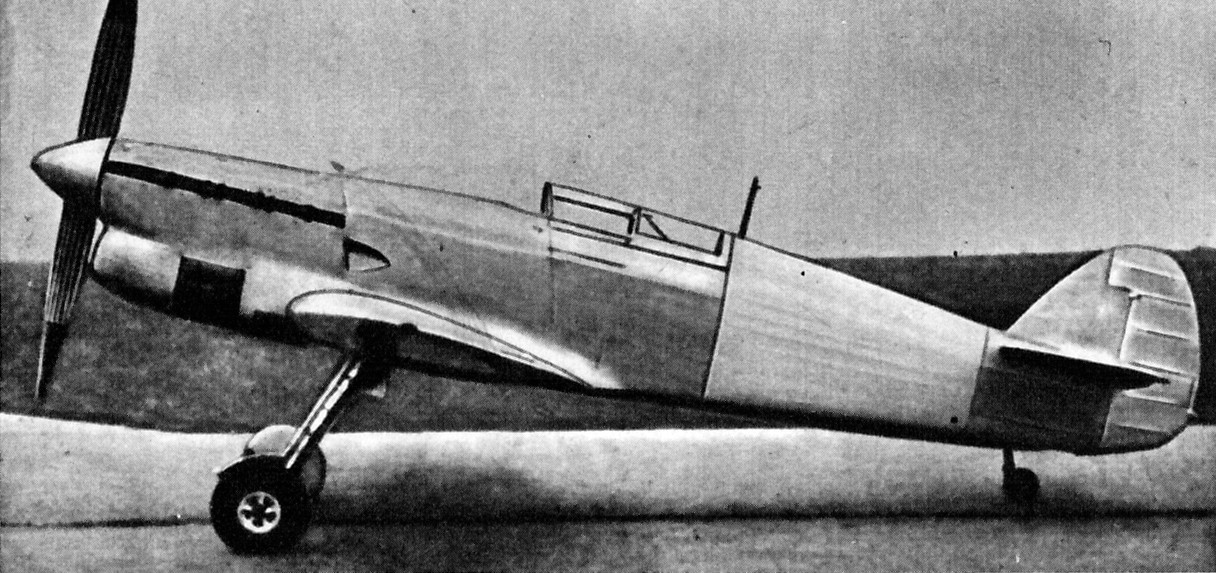 Czechosłowacki samolot myśliwski Avia B-135.